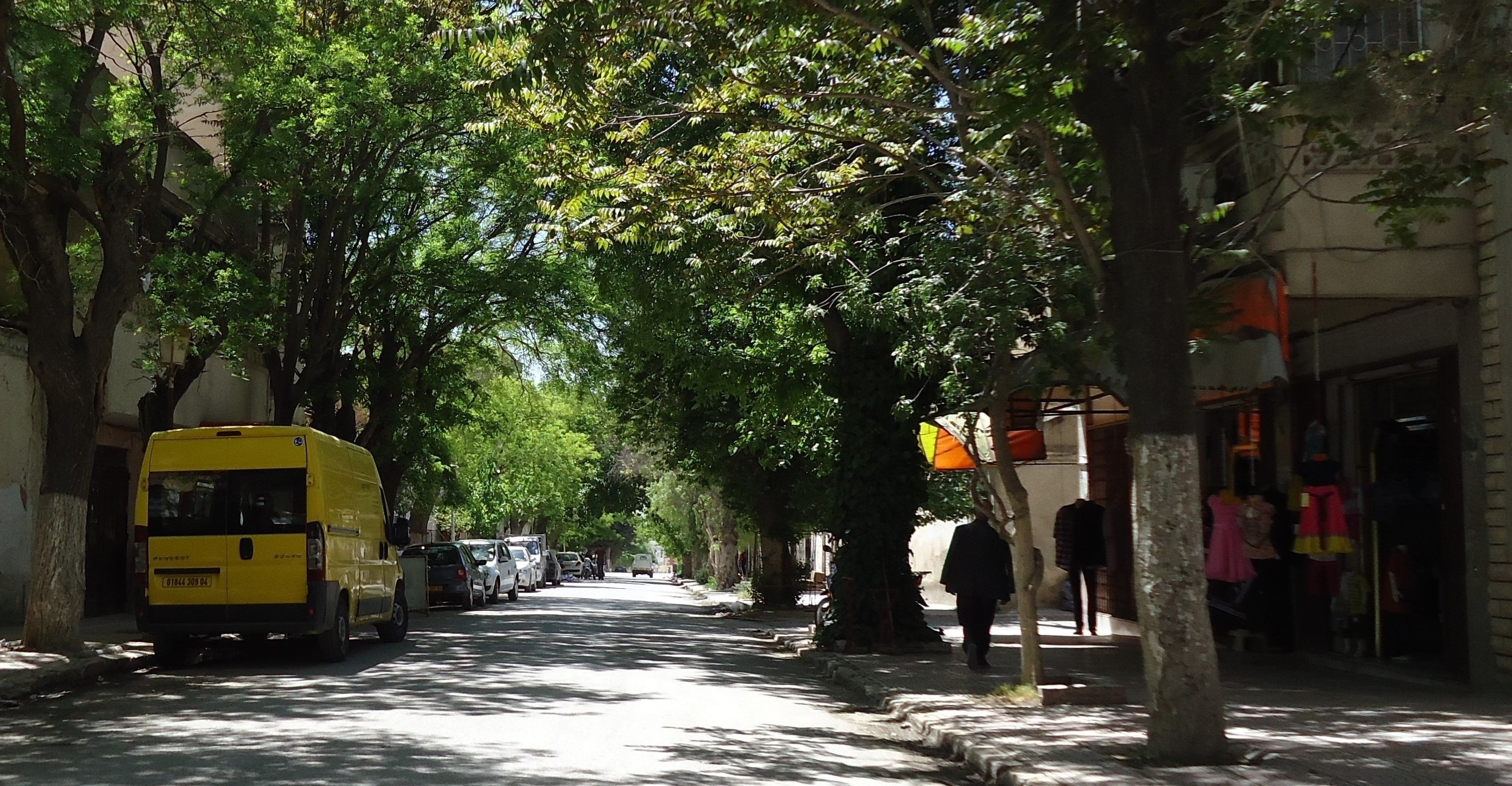 صورة لأحد شوارع عين البيضاء اوم البواقي الجزائر